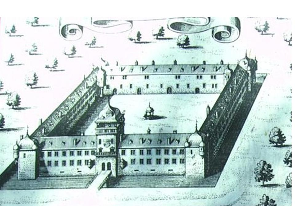 Schloss Neuhaus, Der Stich datiert aus dem 16. Jahrhundert. Er ist außerhalb des Forsthauses im Eingabgsbereich als Repro öffentlich aufgestellt. Ich habe ihn dort abfotografiert, ich glaube im Jahr 2009. EPei 14:33, 16. Jun. 2011 (CEST)